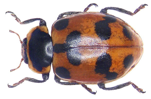 Hippodamia septemmaculata (DeGeer, 1775) Familie: Coccinellidae Groesse: 14,5-7 mm Verbreitung: Europa Ökologie: in Feuchtgebieten Fundort: Germania, Bayern, Oberfranken, Selbitz leg.det. U.Schmidt, 1972 Photo: U.Schmidt, 2007